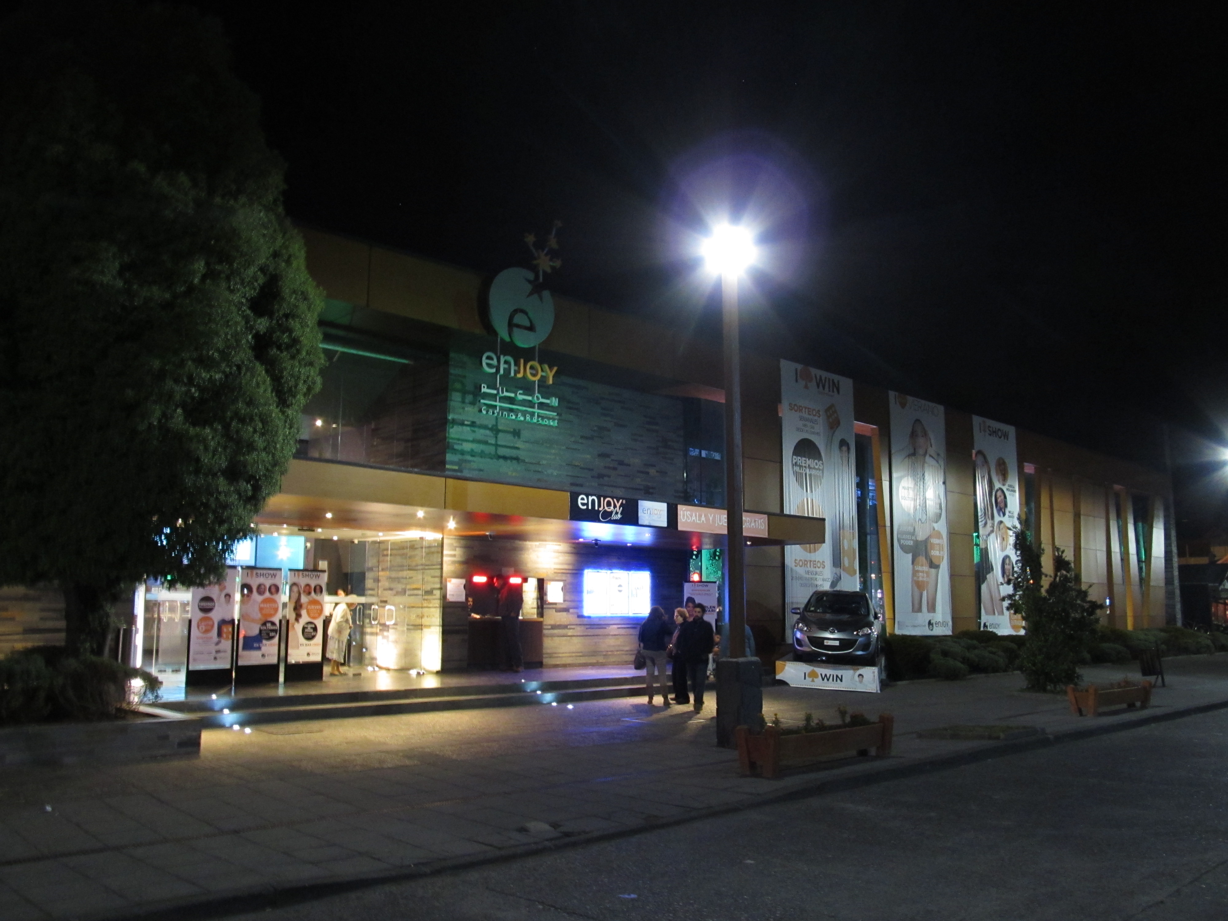 Enjoy Pucón, casino in Chile.